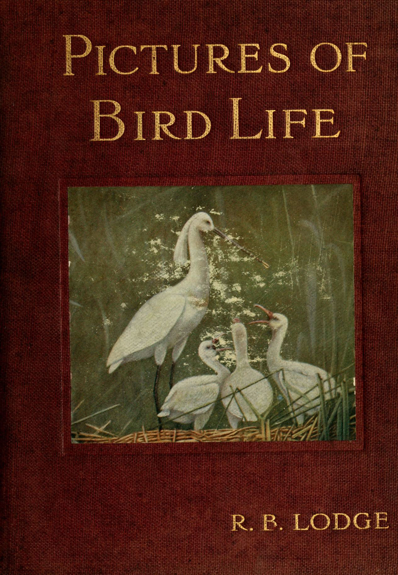 "^^ ^ .^ -/ . . B. LODGE